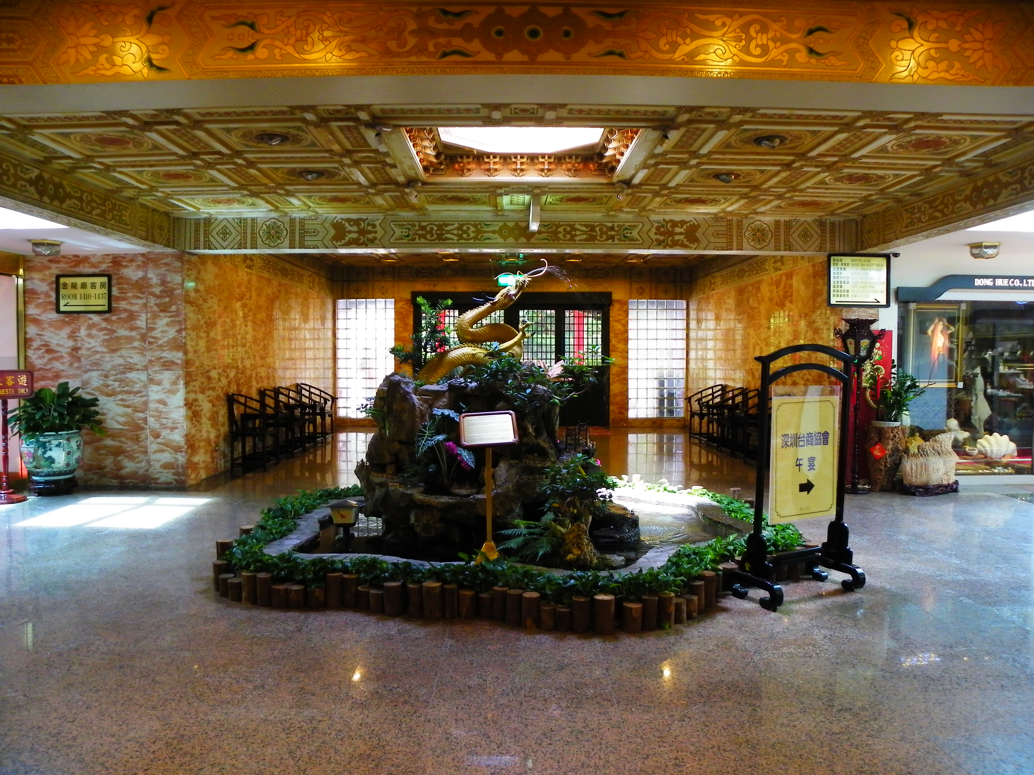 臺北市圓山大飯店金龍廳大廳的銅龍，原置於臺灣神宮，1987年整修時鍍金。